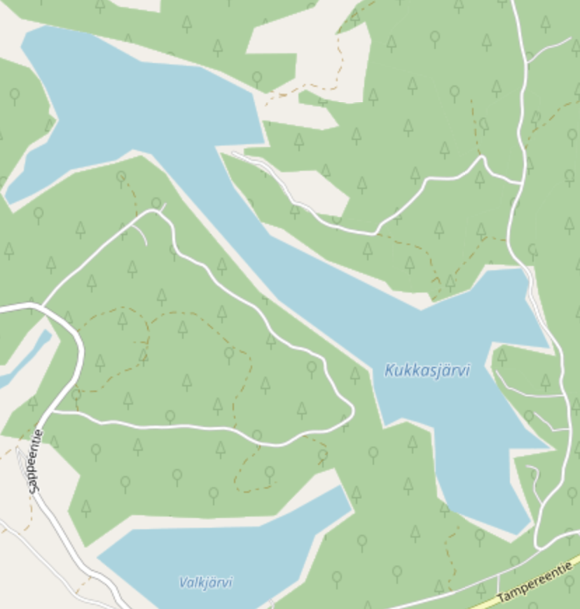 Kukkasjärvi